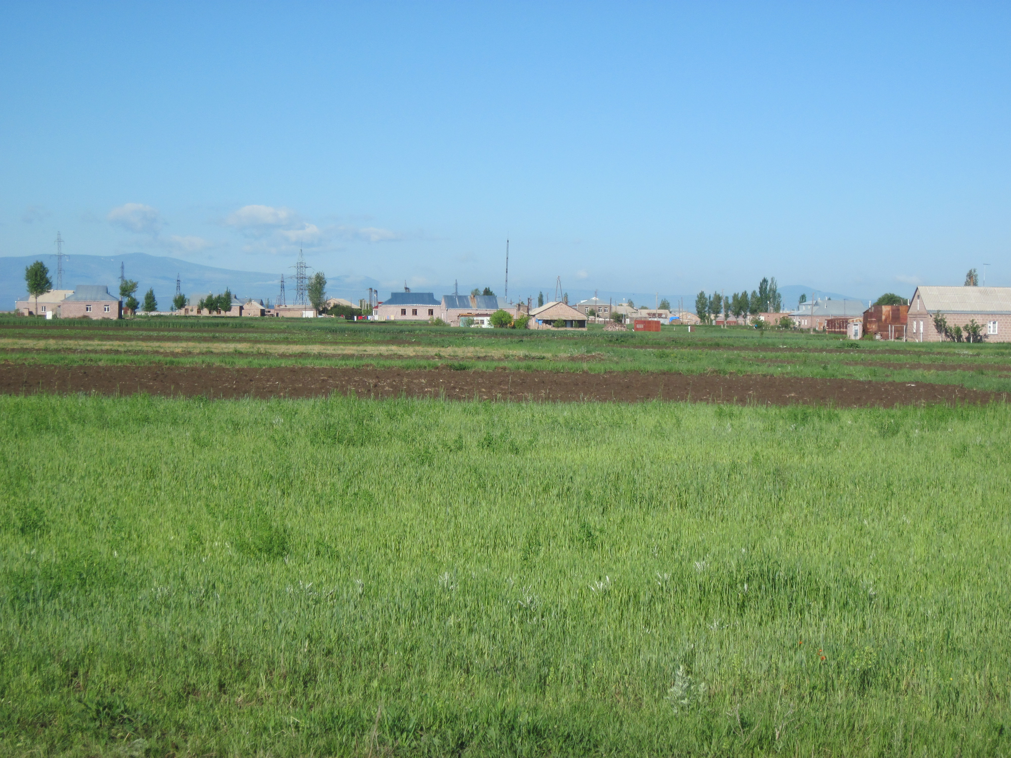 Համայնապատկեր Ազատան գյուղից